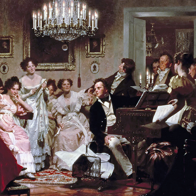 detail